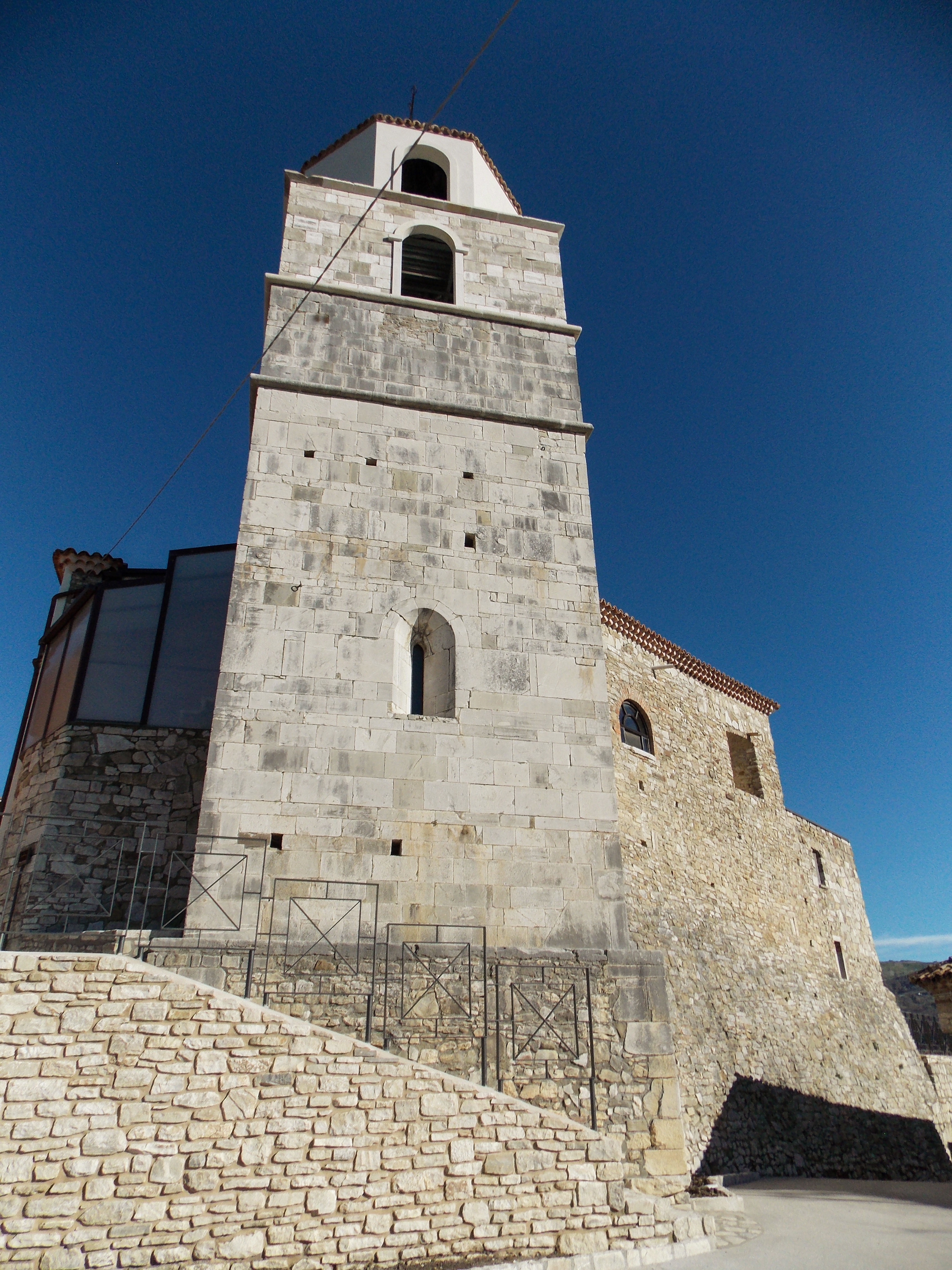 Il campanile della chiesa di Santa Maria dei Greci a Molinara (BN)